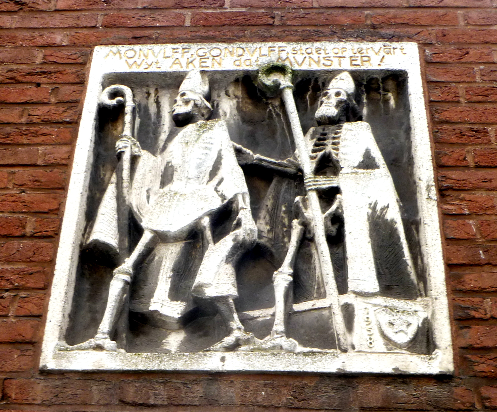 Relief Klappergasse Aachen zum Gedenken an die Maastrichter Bischöfe Mundolphus und Gundolphus anlässlich ihres - posthumen - Besuches zur Einweihung des Aachener Münsters